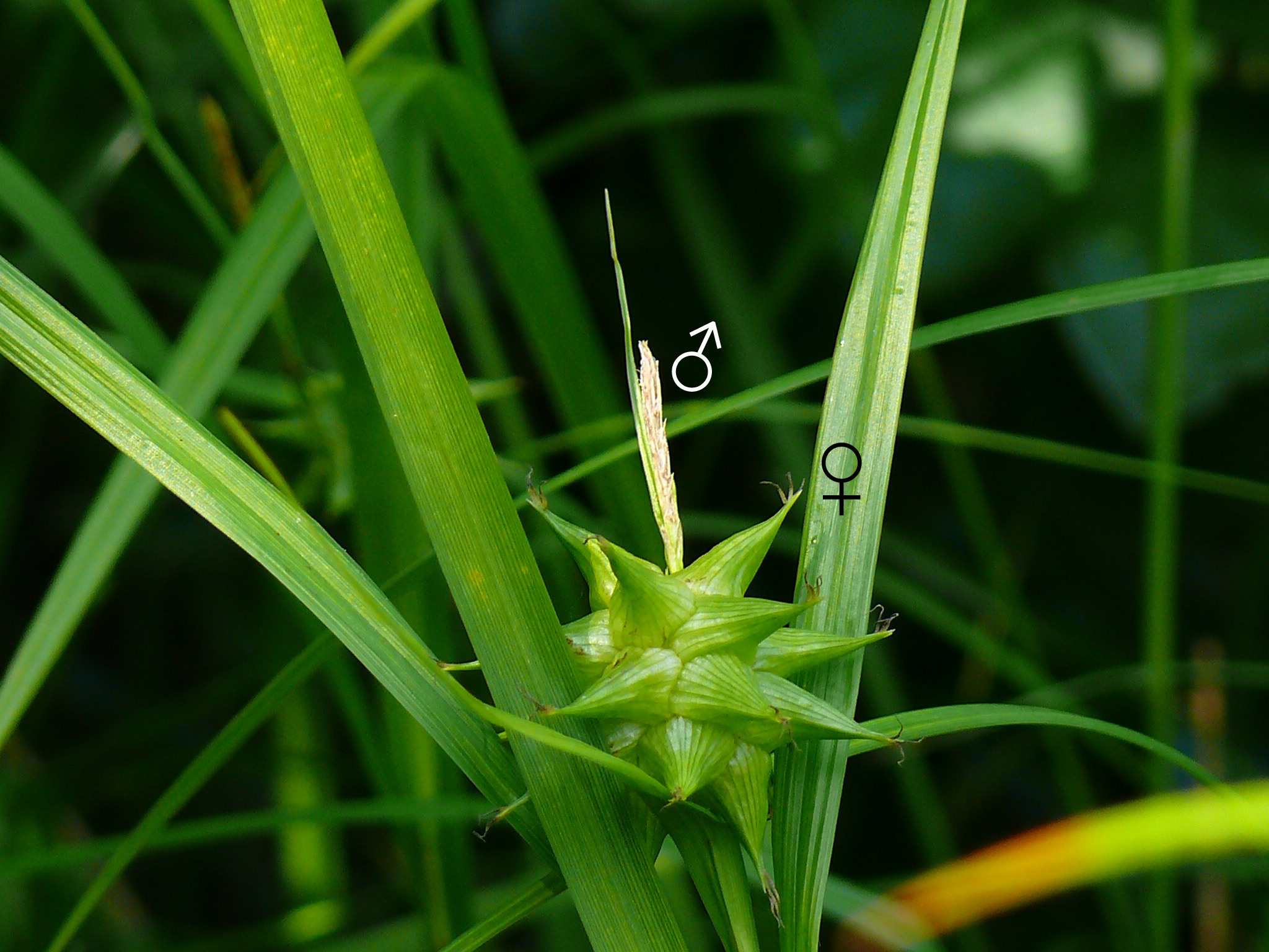 Carex grayi